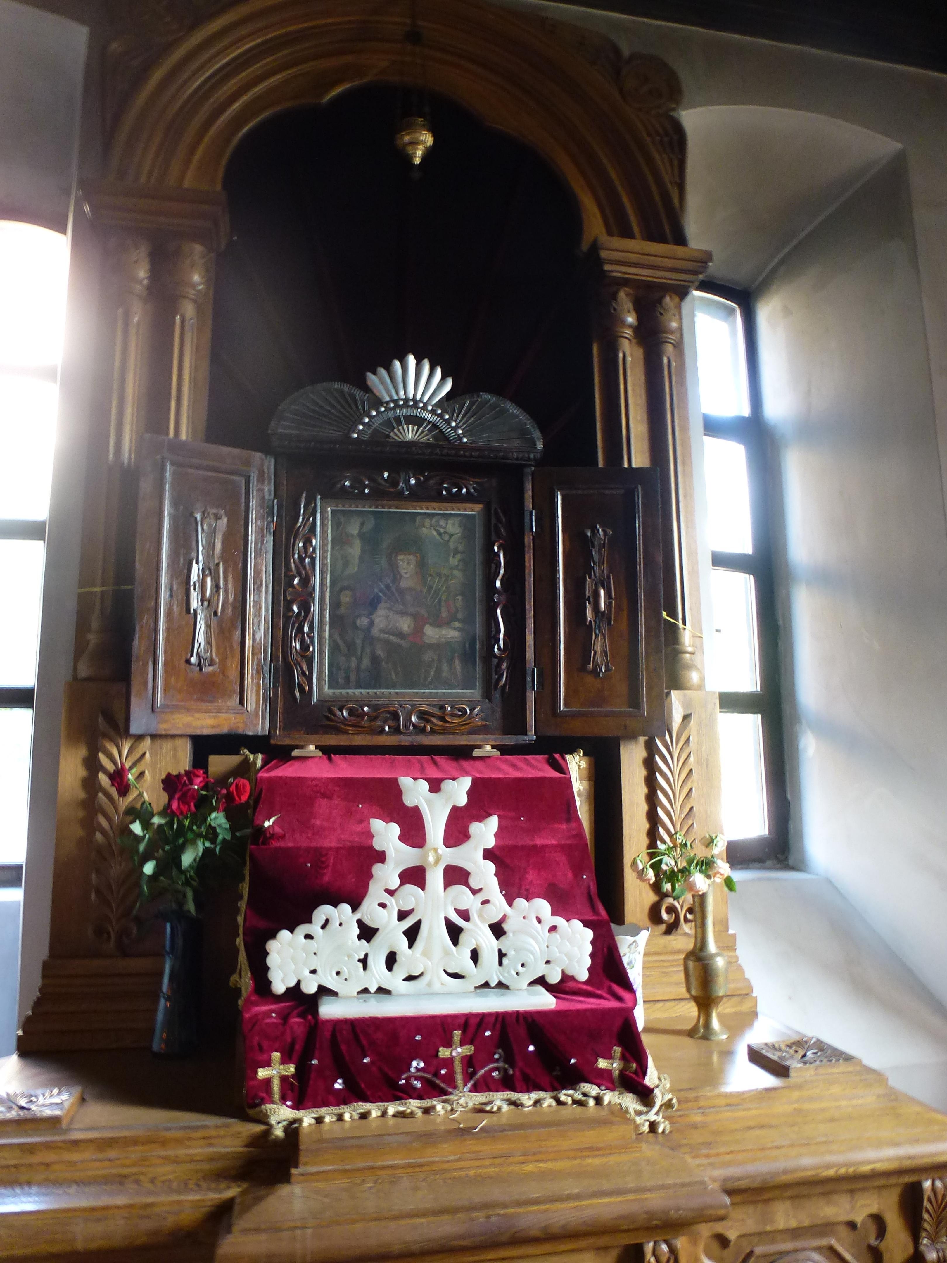 Սուրբ Յոթ Վերք, Գյումրի 1/4.870